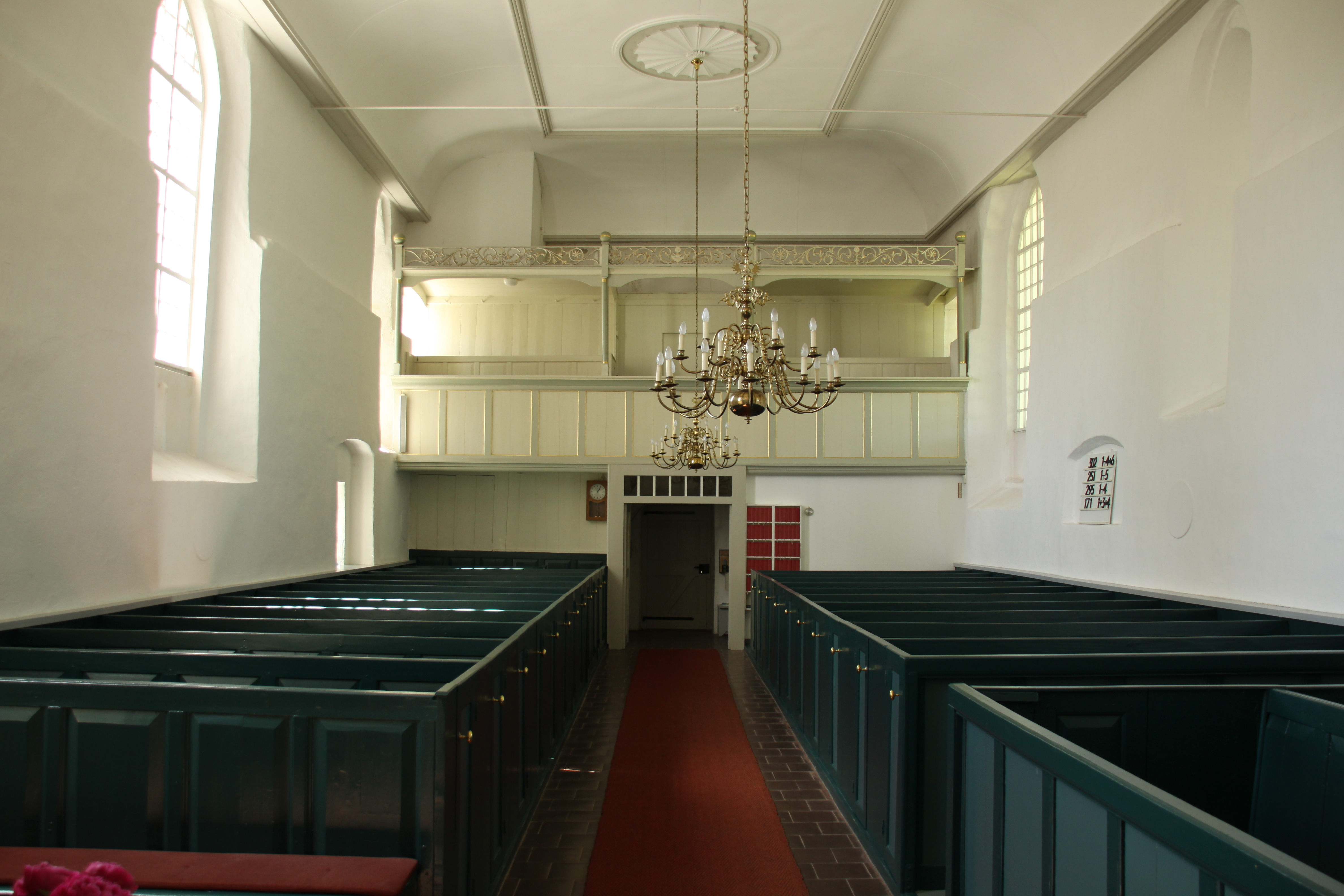 Innenraum der Uplewarder Kirche